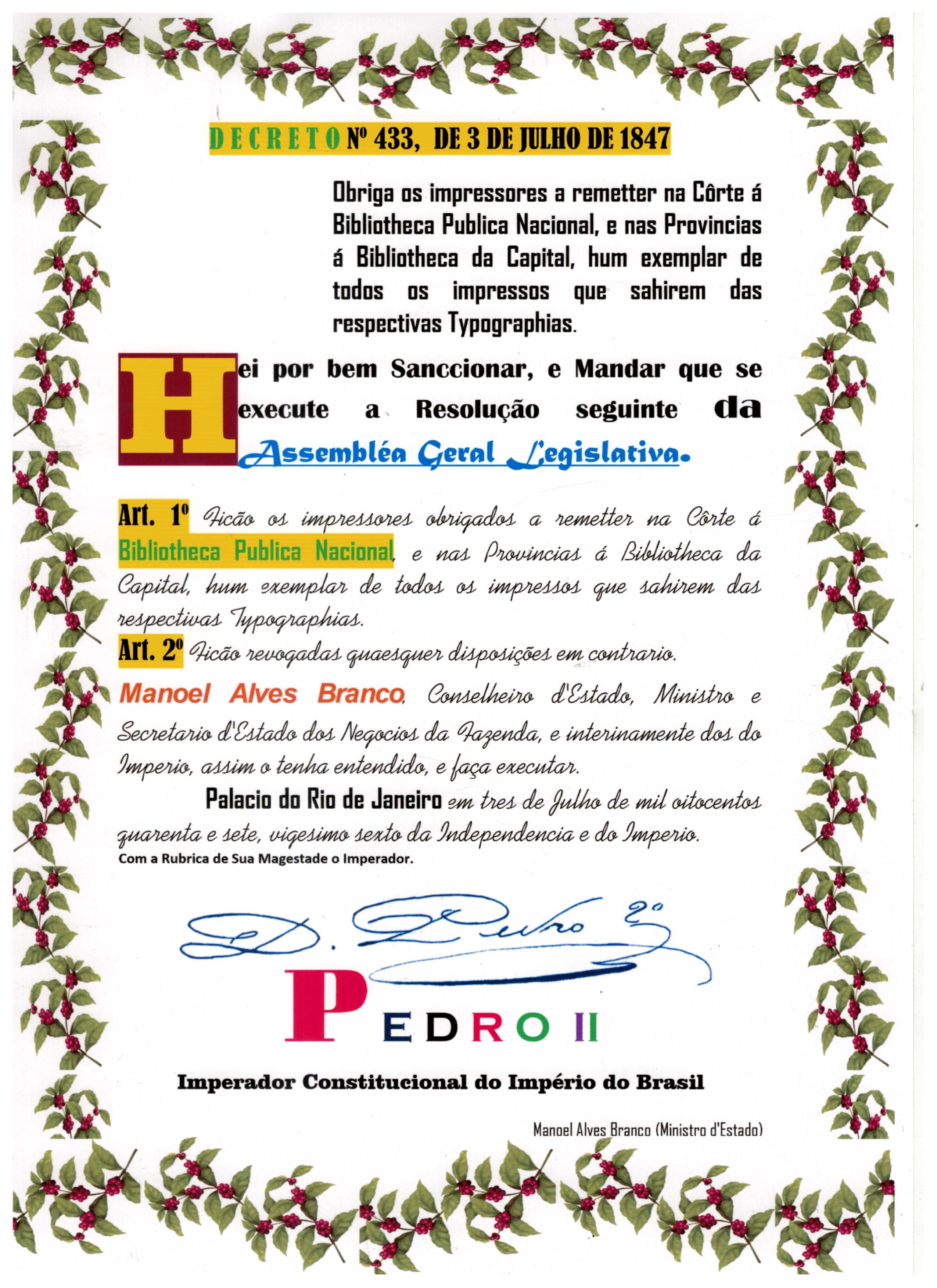 Réplica cerimonial da Lei Brasileira do Depósito Legal de 3 de julho de 1847.